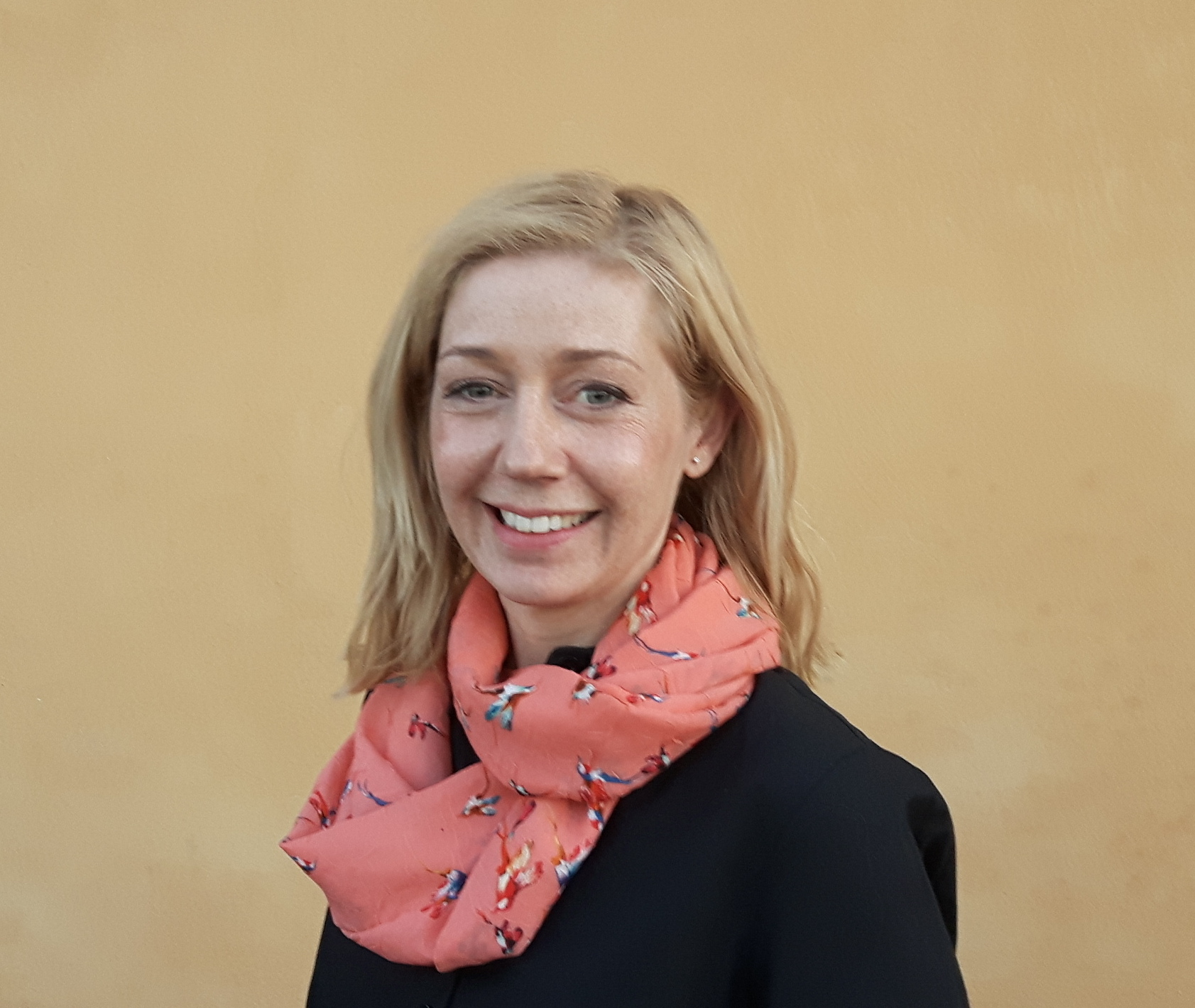 Elin Jönsson, Swedish journalist.